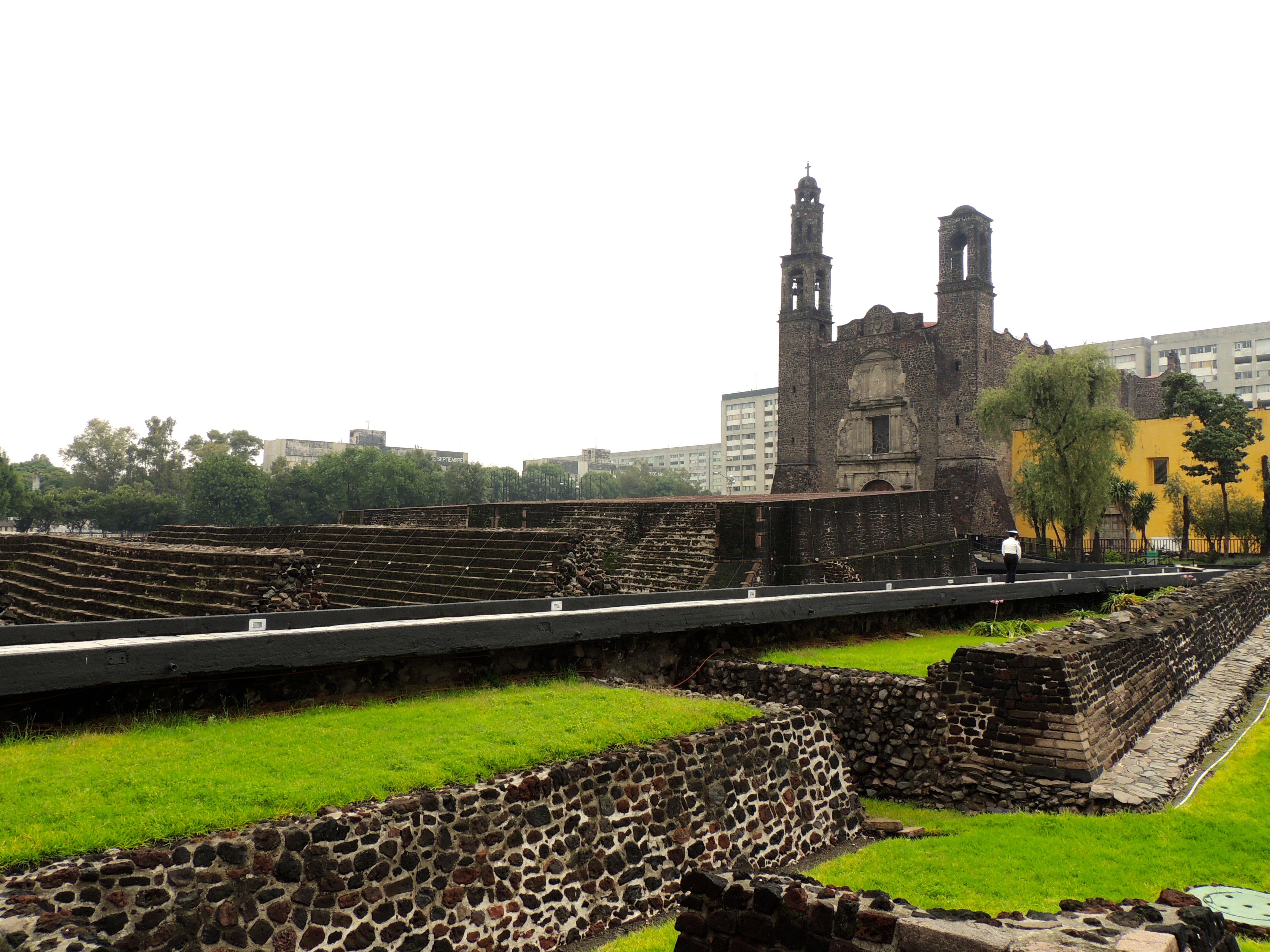 Zona Arqueológica de Tlatelolco